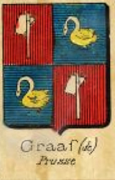 Wappen der Familie De Graaf, einer Nebenlinie der Familie De Graeff (Amsterdam, Niederlande). Registriert als: Graaff (de), Prusse - Orig. de Hollande